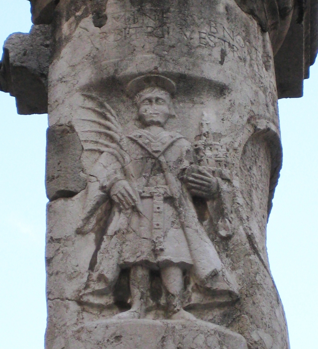 lik Svetog Vida na stendarcu u Rijeci, gdje je uklesan 1509